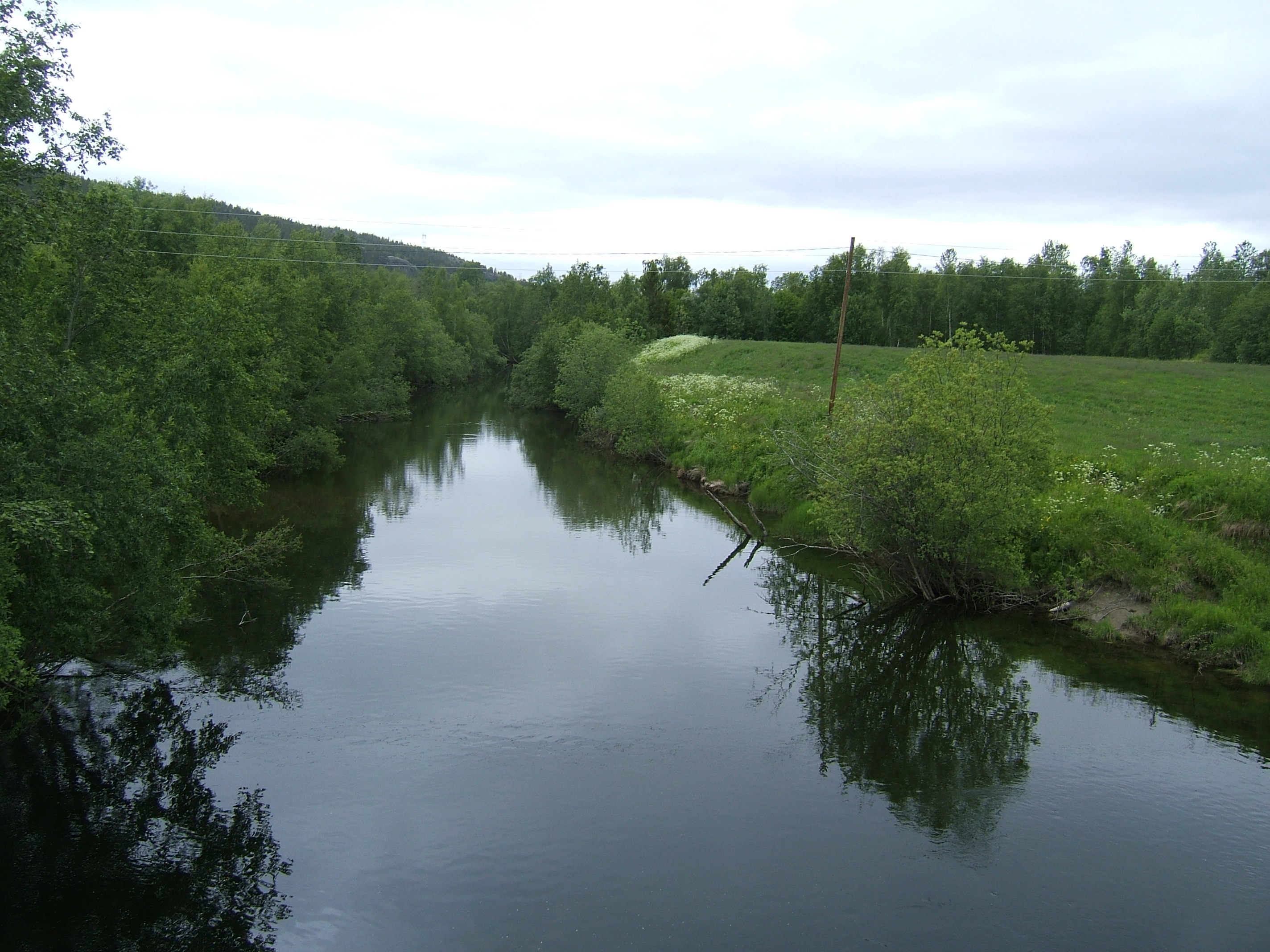 Tverrelva